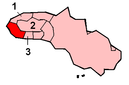 Het Kodisch tussen de andere talen van Soemba (Oost-Nusa Tenggara, Indonesië). Eigen werk, vrij voor het publiek.